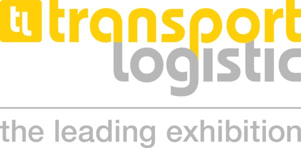 Das aktuelle Logo der Messe transport logistic (Stand 2019)